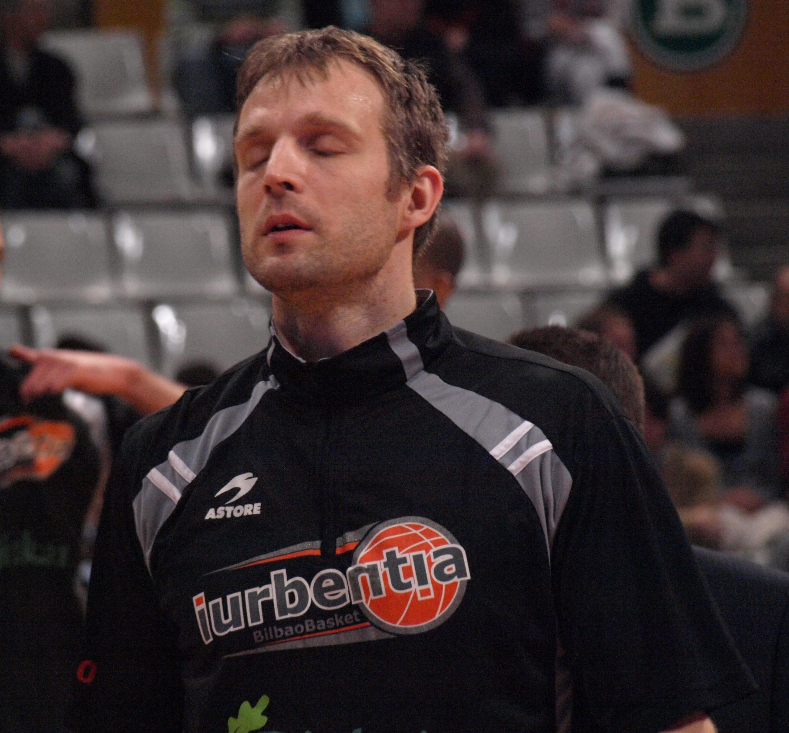 Pedrag Savovic en el encuentro que enfrentó al Iurbetia Bilbao con el DKV Joventut de la liga ACB 2008/09 en el olímpico de Badalona